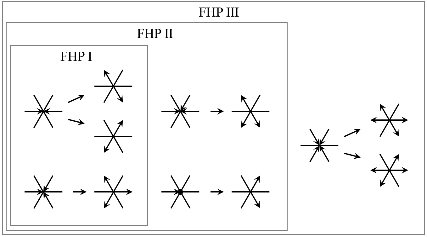 中文（中国大陆）: 格子气自动机的三种FHP模型的碰撞规则。FHP I包括对头二体碰撞和对称三体碰撞；FHP II还包括非对称三体碰撞及含静止粒子的碰撞，FHP III还包括对称四体碰撞。